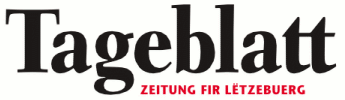 Logo Tageblatt. Zeitung fir Lëtzebuerg